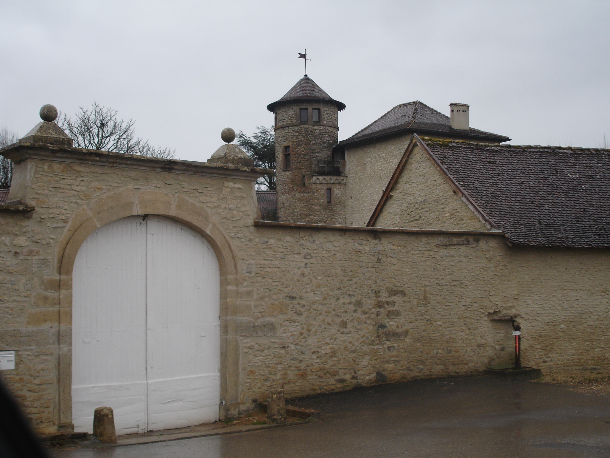 Moras (38) : l'entrée du château